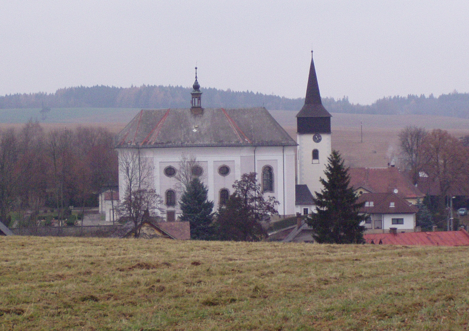 Hajnice - kostel sv. Mikuláše15